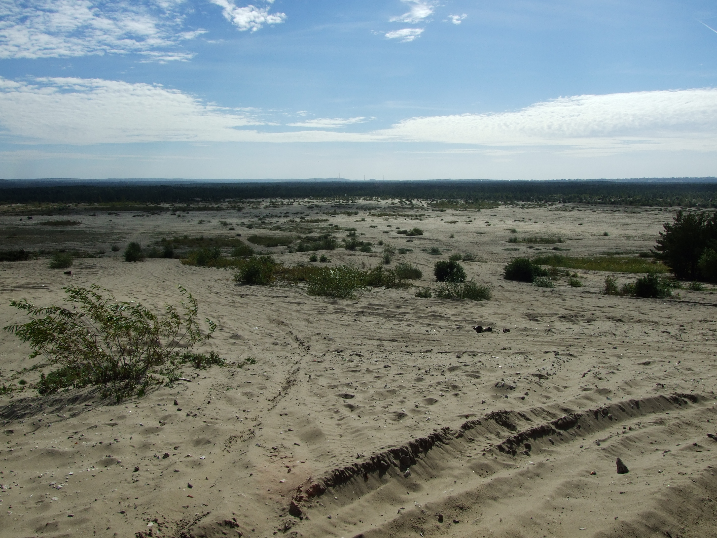 Pustynia Błędowska w okolicach Chechła